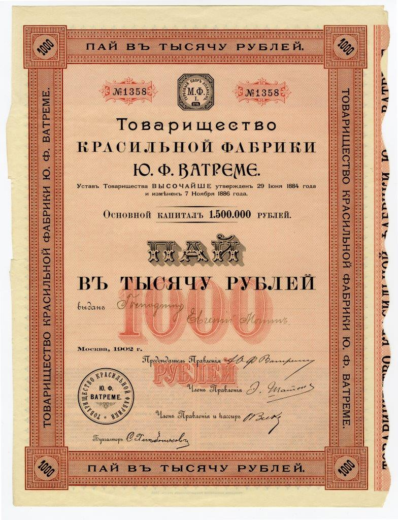 Пай в 1000 руб., именной, Товарищества красильной фабрики Ю. Ф. Ватреме. Москва, 1902 г.